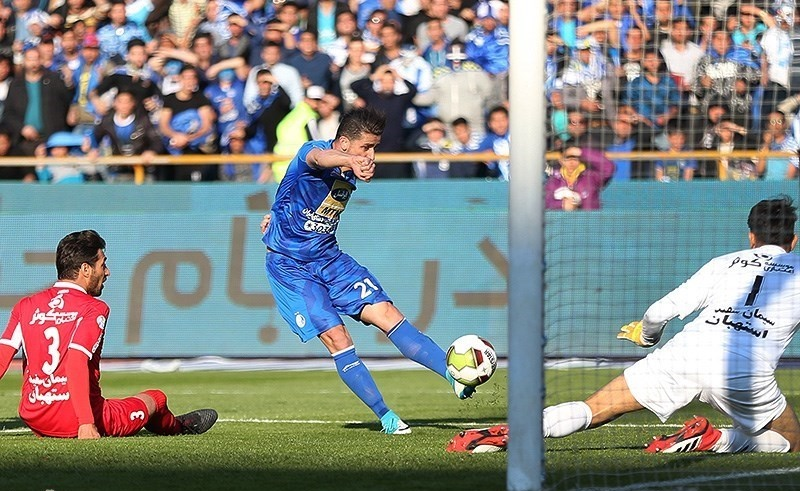 گل وریا غفوری مقابل پرسپولیس در دربی ۸۶